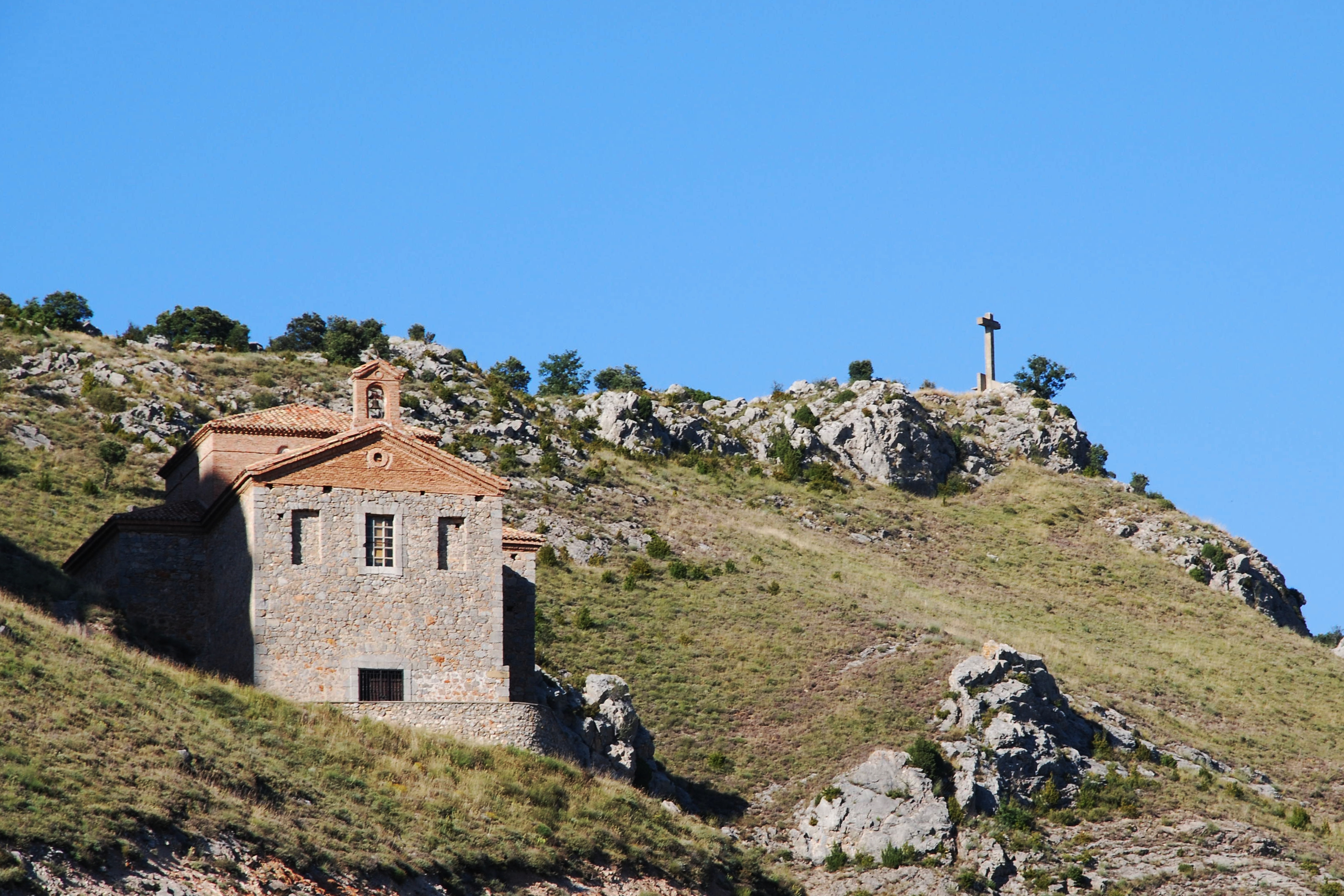 Real Basílica de Santiago en Clavijo, La Rioja, España.